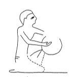 Keramikherstellung im Alten Ägypten nach einer Darstellung in einem Grab in Beni Hasan; Formen des runden Bodens einer Schale.